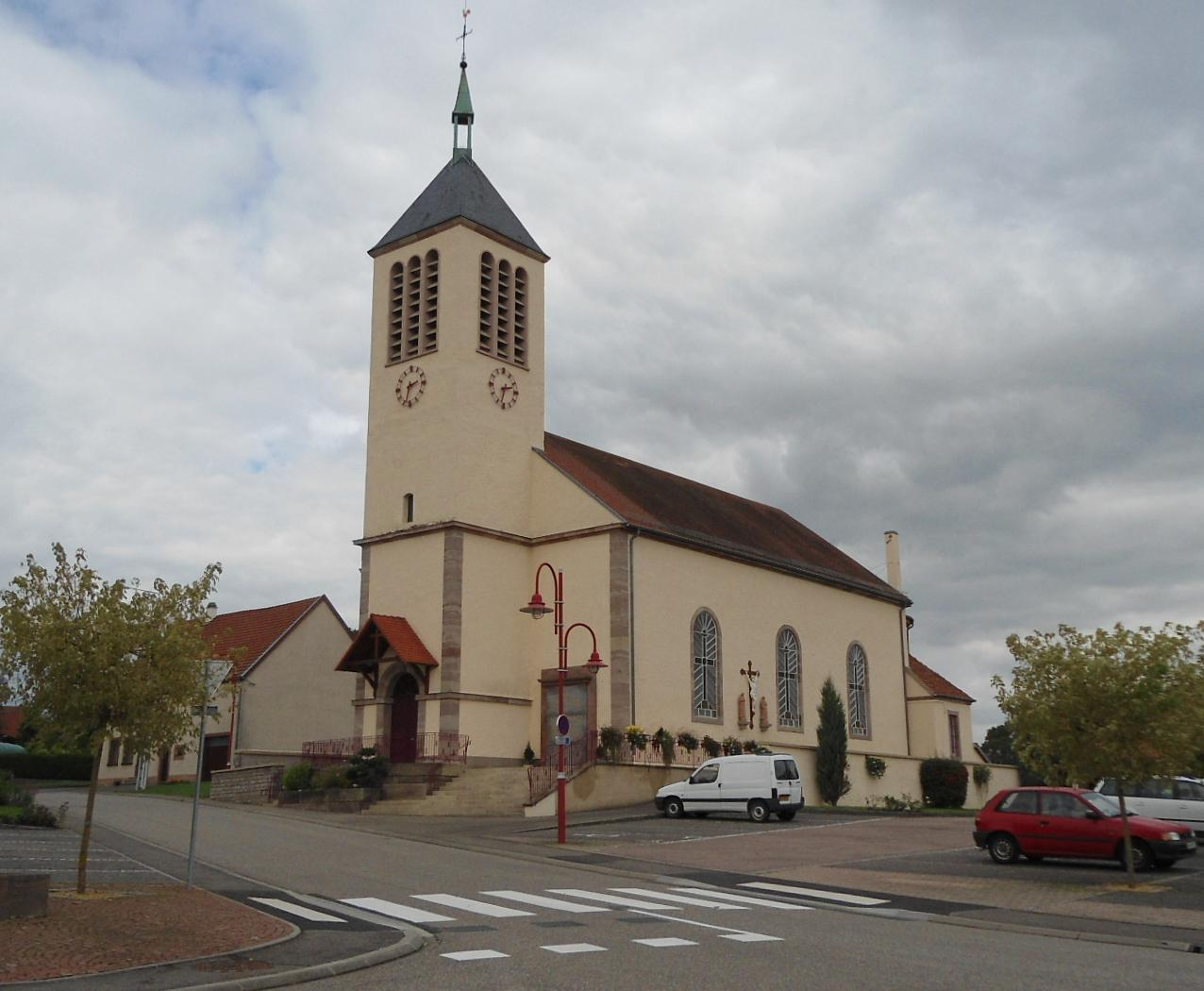 Ormersviller Kirche